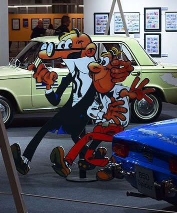 Exposició ‘’’Vinyetes sobre rodes’’’ al 34è Saló Internacional del Còmic de Barcelona. Mortadel·lo i Filemó rodejats de diversos còmics.